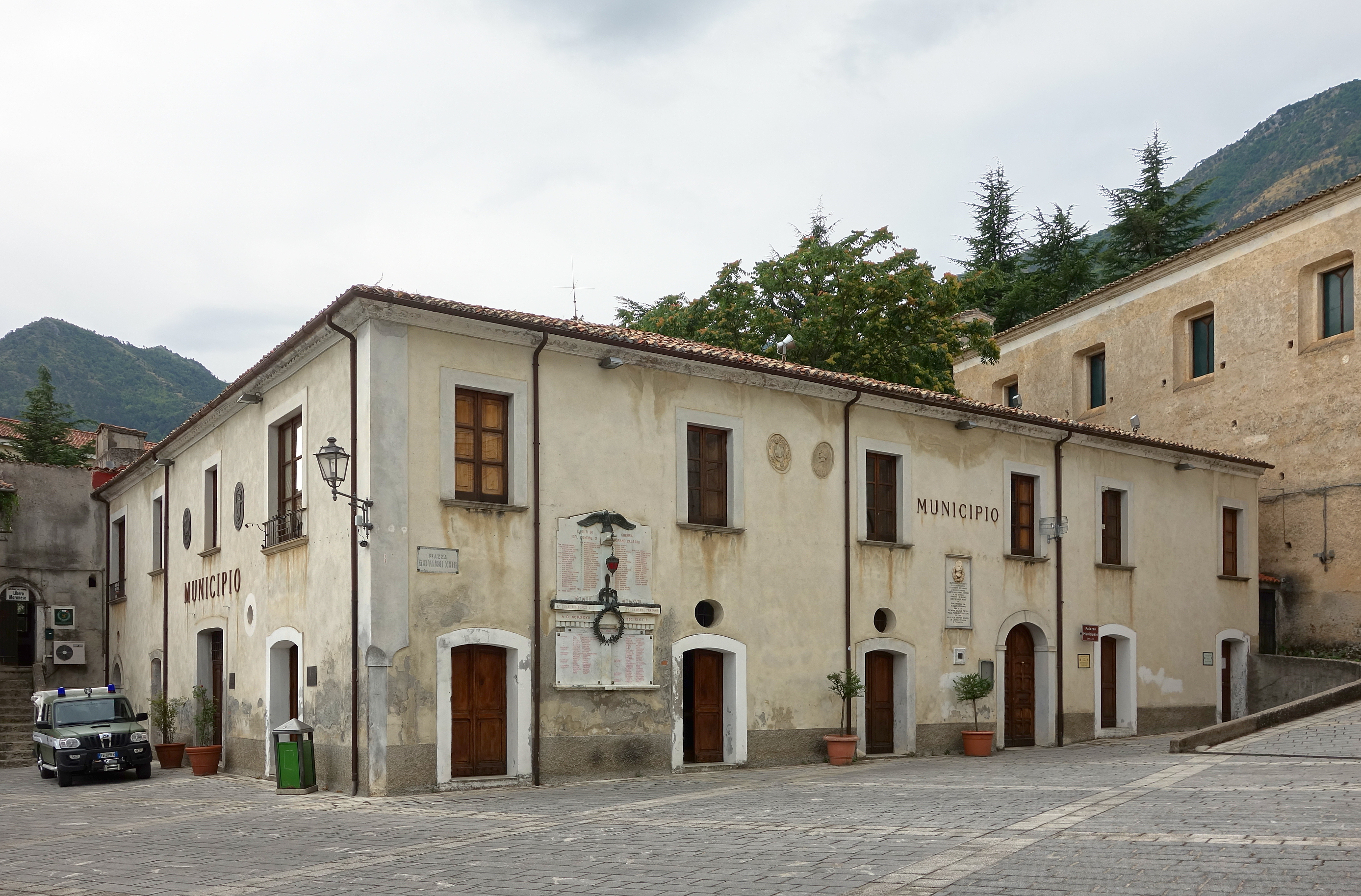 La mairie de Morano Calabro.